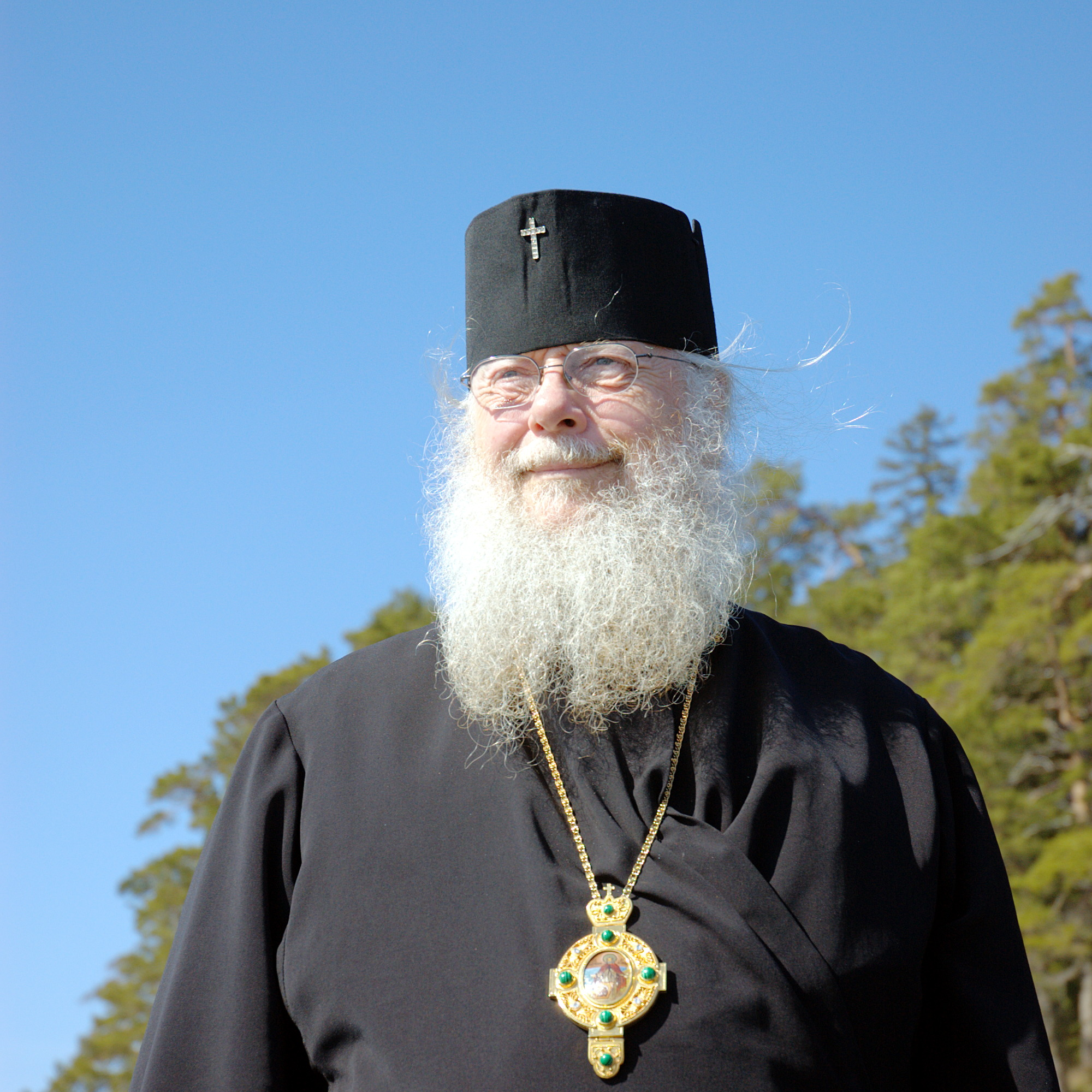 Владыка Серафим, архиепископ Оттавский и Канадский, помнит Россию еще с советских времен. Тогда он приезжал в Союз простым священником с паломниками из автономной Финской Православной Церкви, ничуть не стесняясь ходить по улицам наших городов и весей в подряснике.